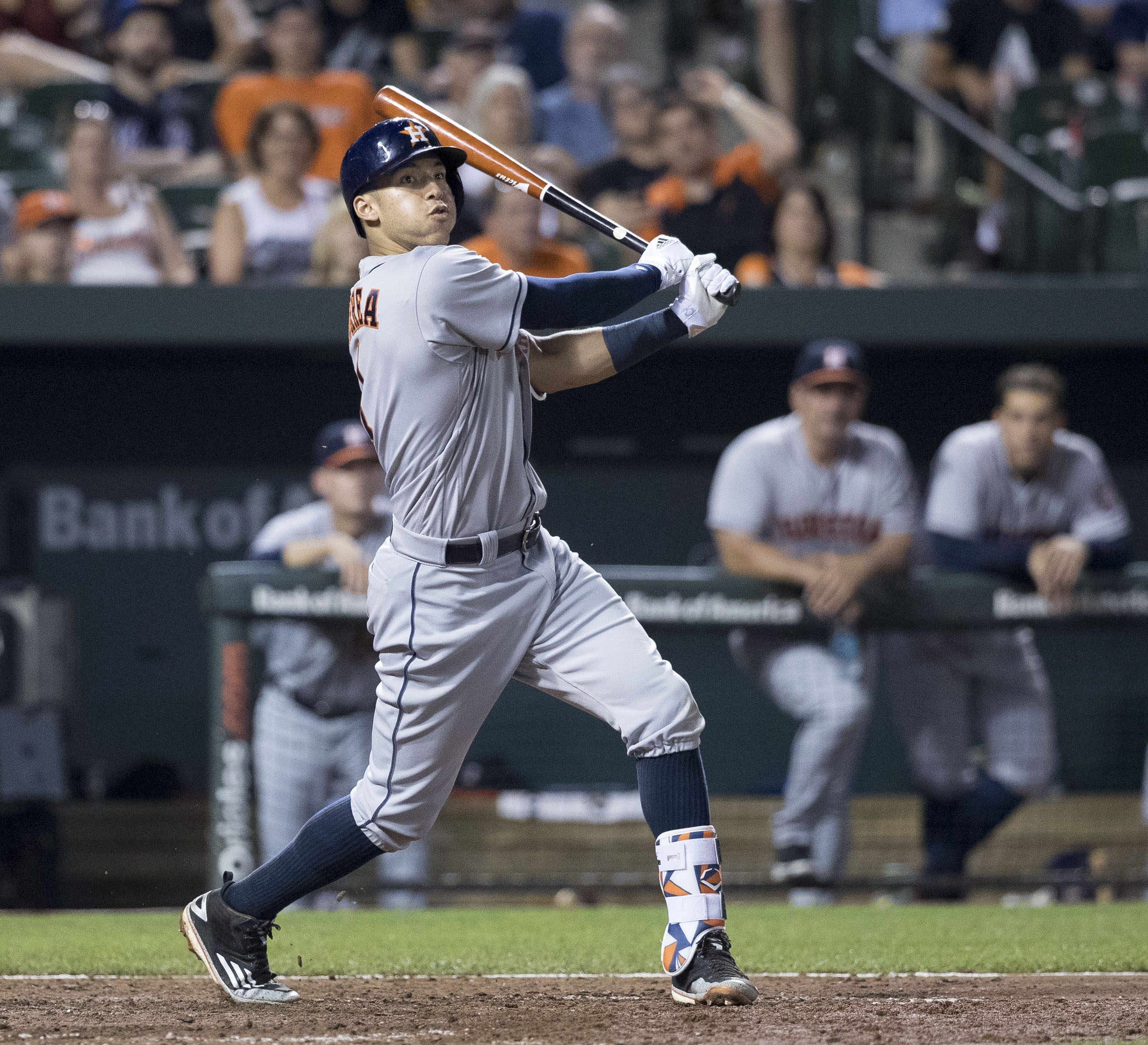 Astros at Orioles 8/18/16